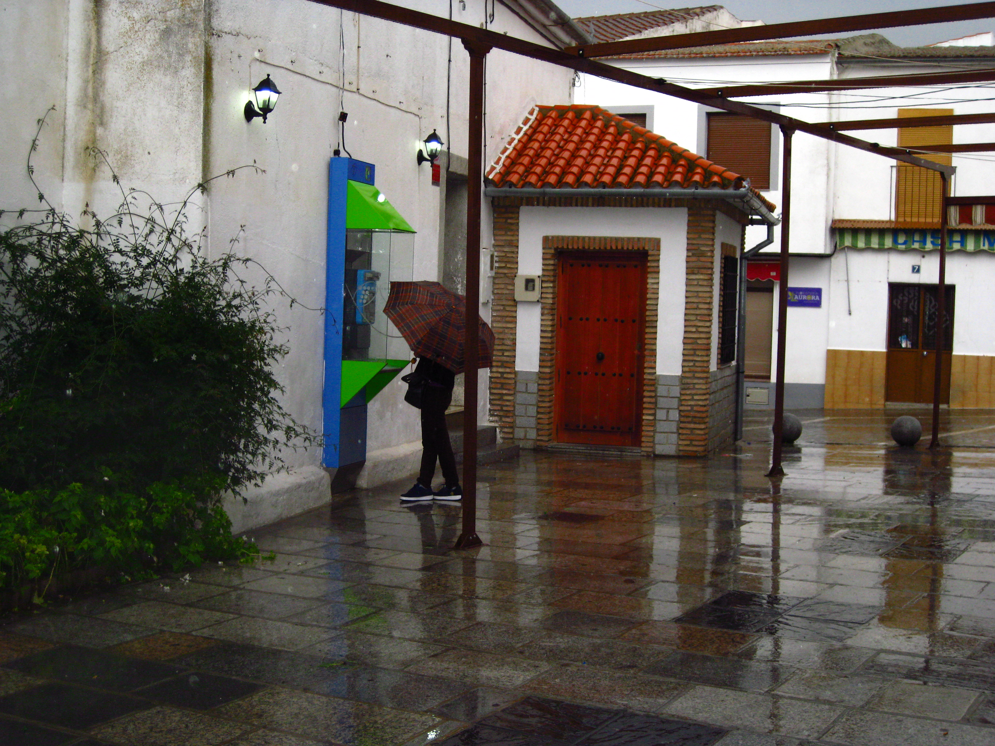 Terraza bar - cafetería " El Paisa ".